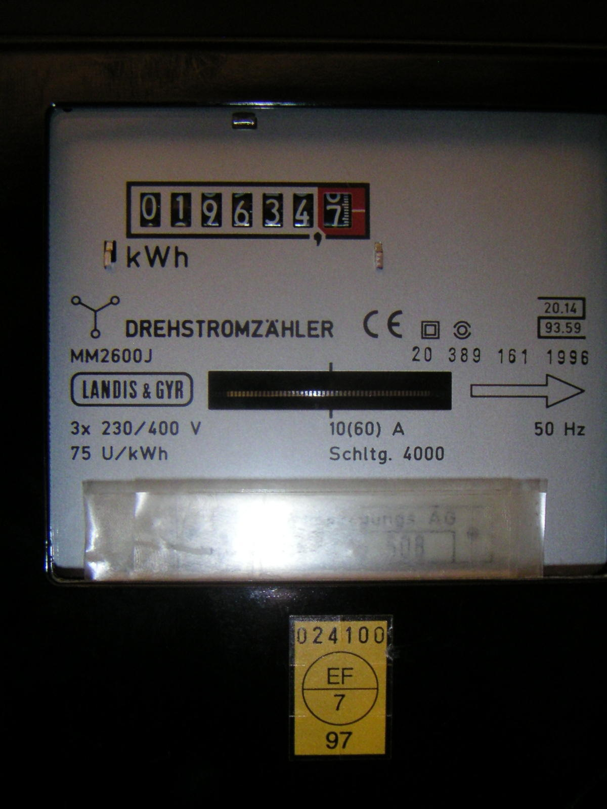 Drehstromzähler von landis & Gyr; selbst fotografiert, GNU Free documentation Licence